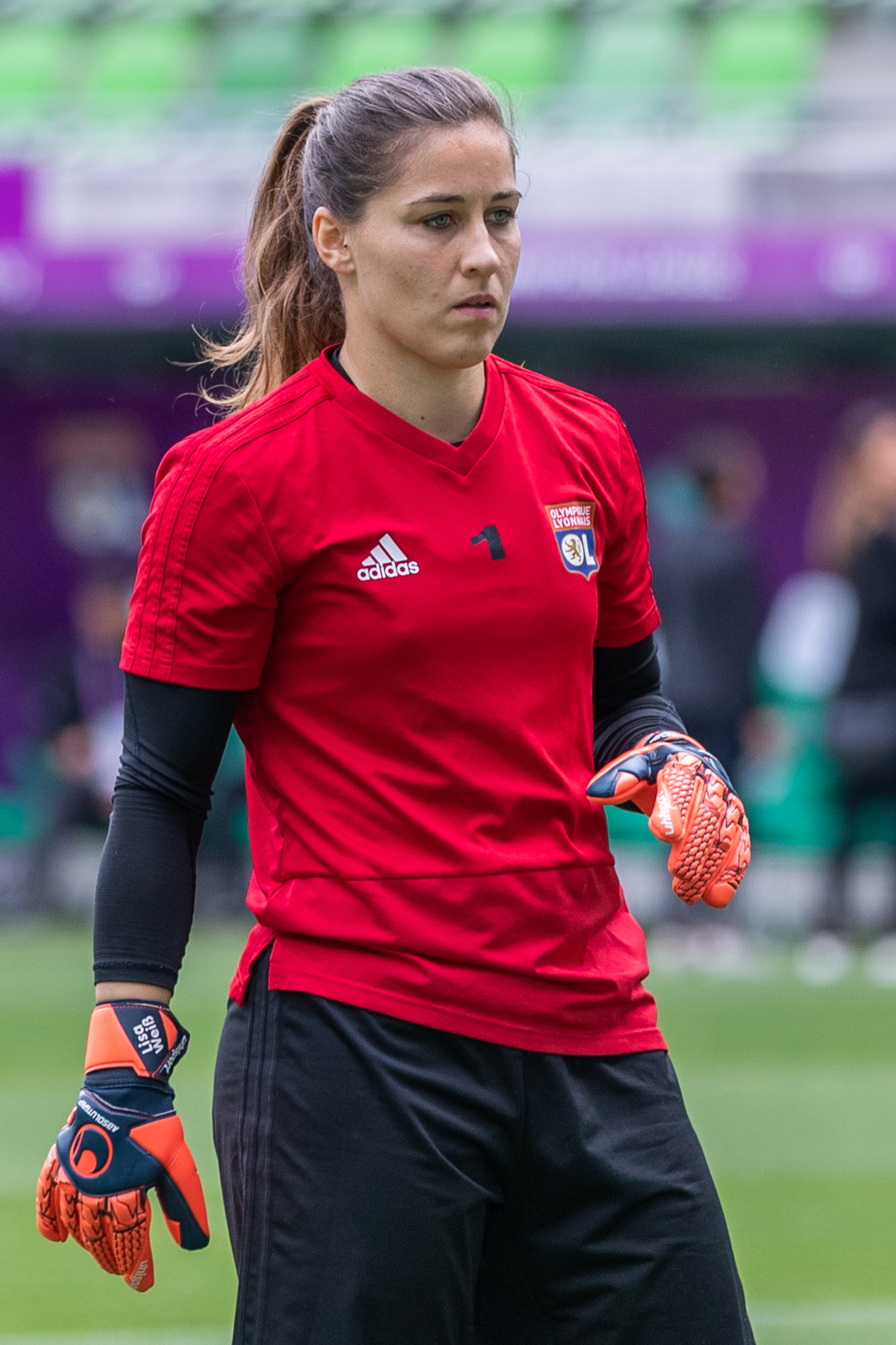 Fußball, Frauen, UEFA Women's Champions League, Olympique Lyonnais - FC Barcelona; Lisa Weiss (Olympique Lyon, 1, Torwart, goal keeper); beim Abschlusstraining